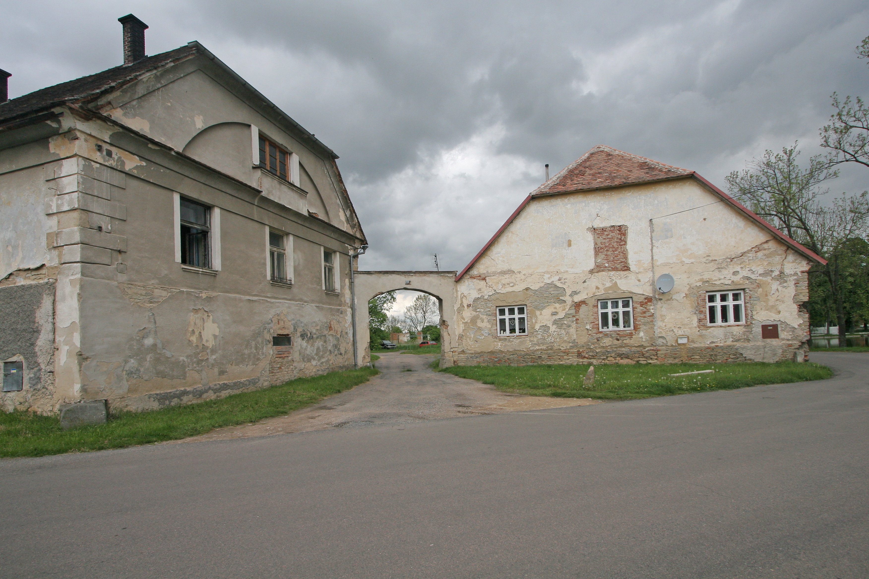 Libanice čp. 1 a 2